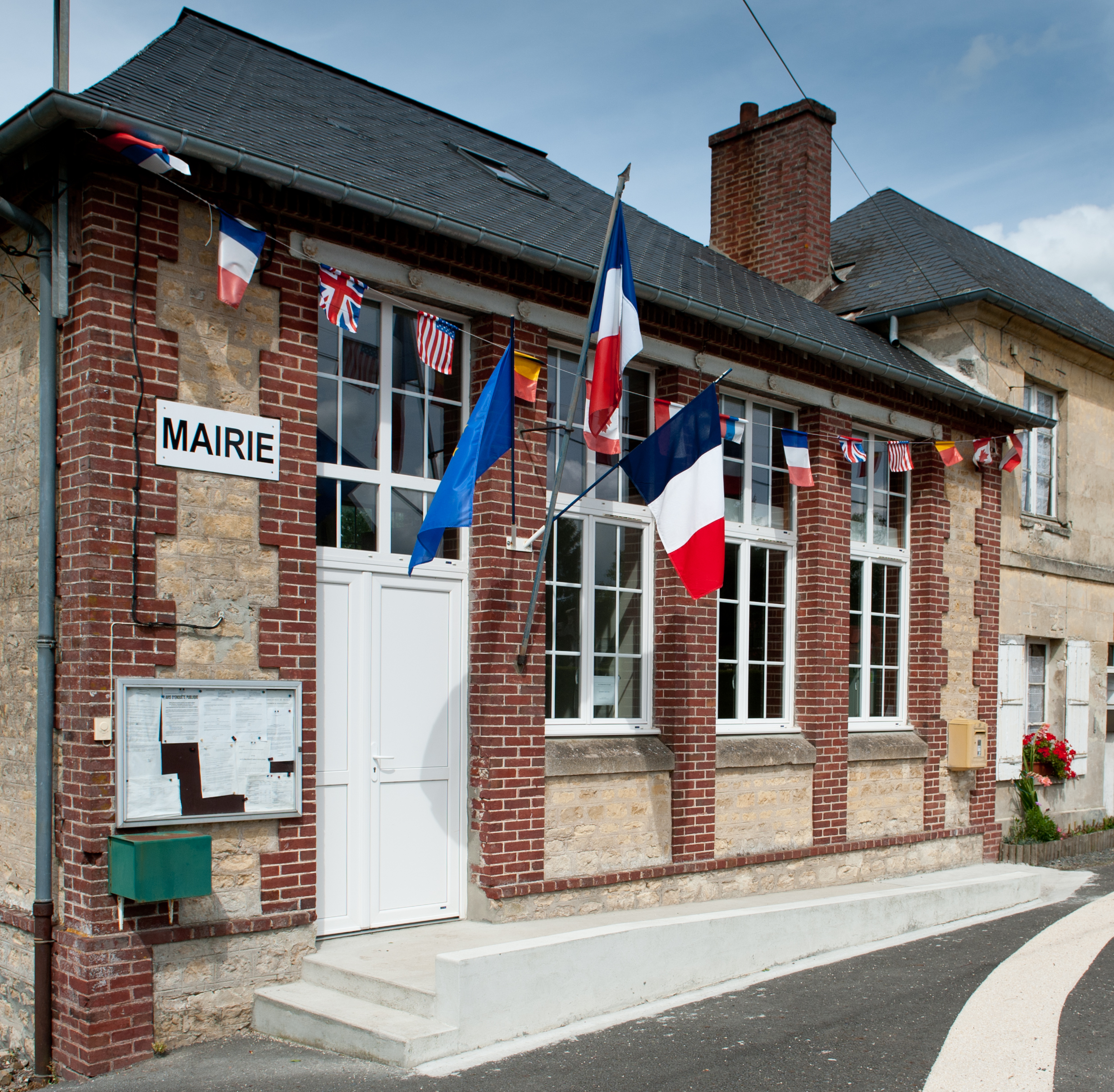 Mairie de Saint Jouin